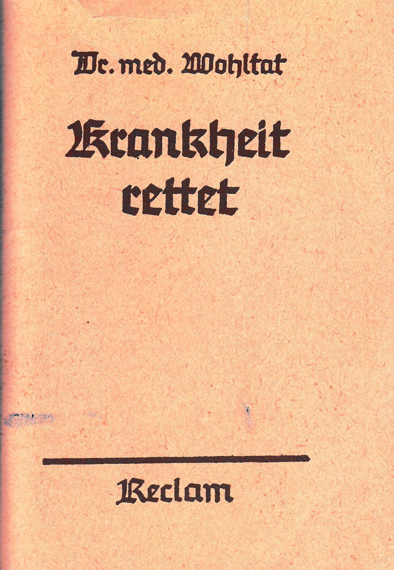 Reclam-Museum, Leipzig: Tarnschrift von 1943, die ein Heft von Reclams Universal-Bibliothek imitiert.